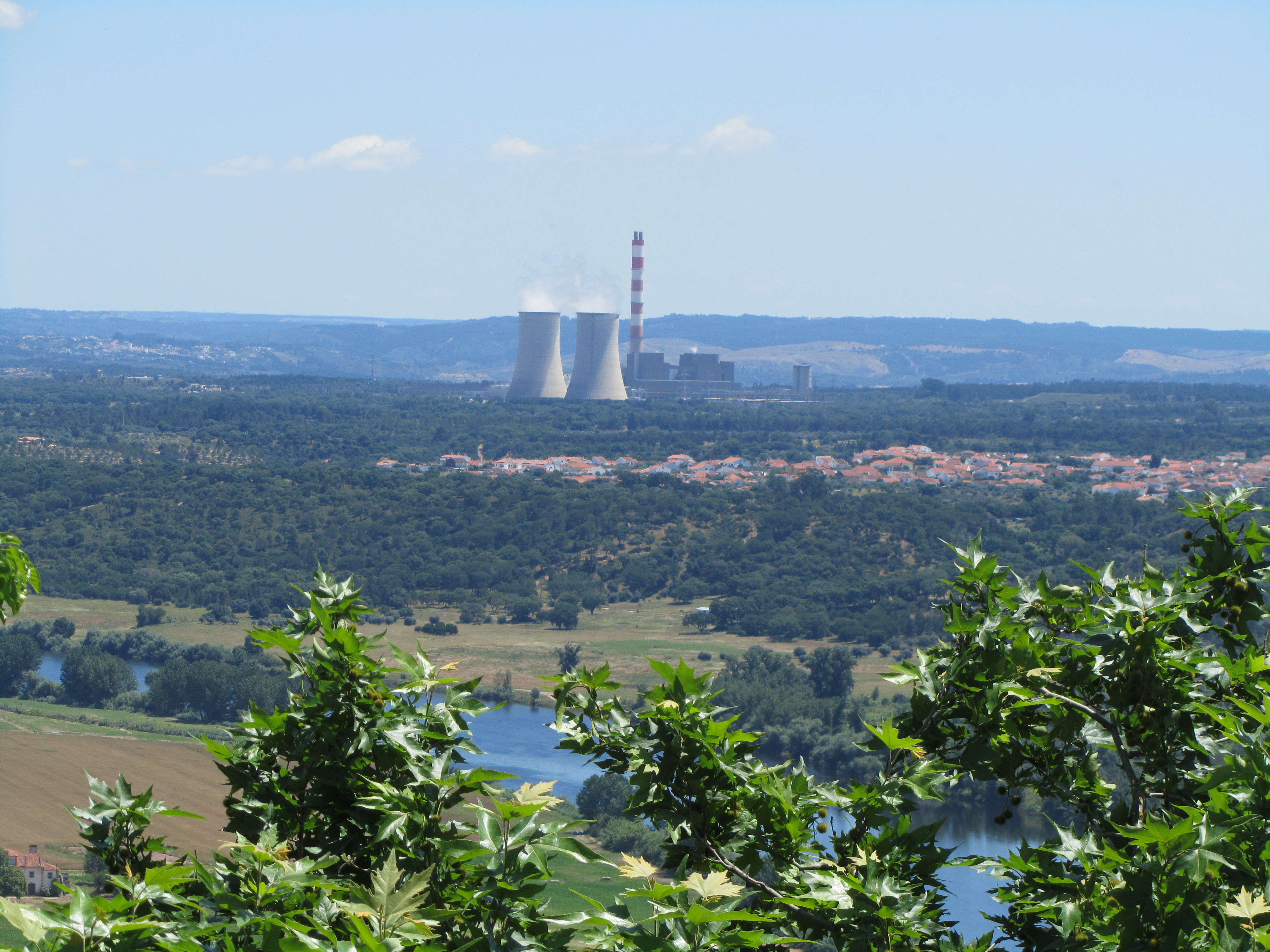 Vista geral da central a partir do castelo da Abrantes